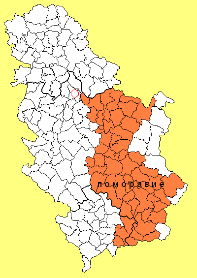 Поморавие